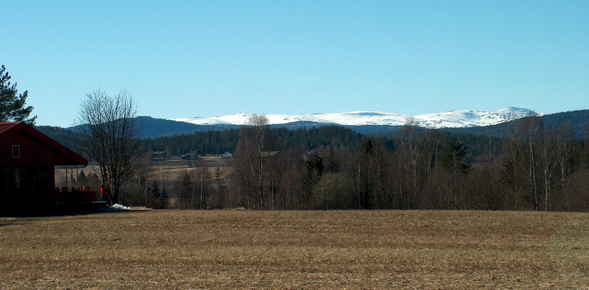 Utsyn mot Norefjell fra Soknedalen